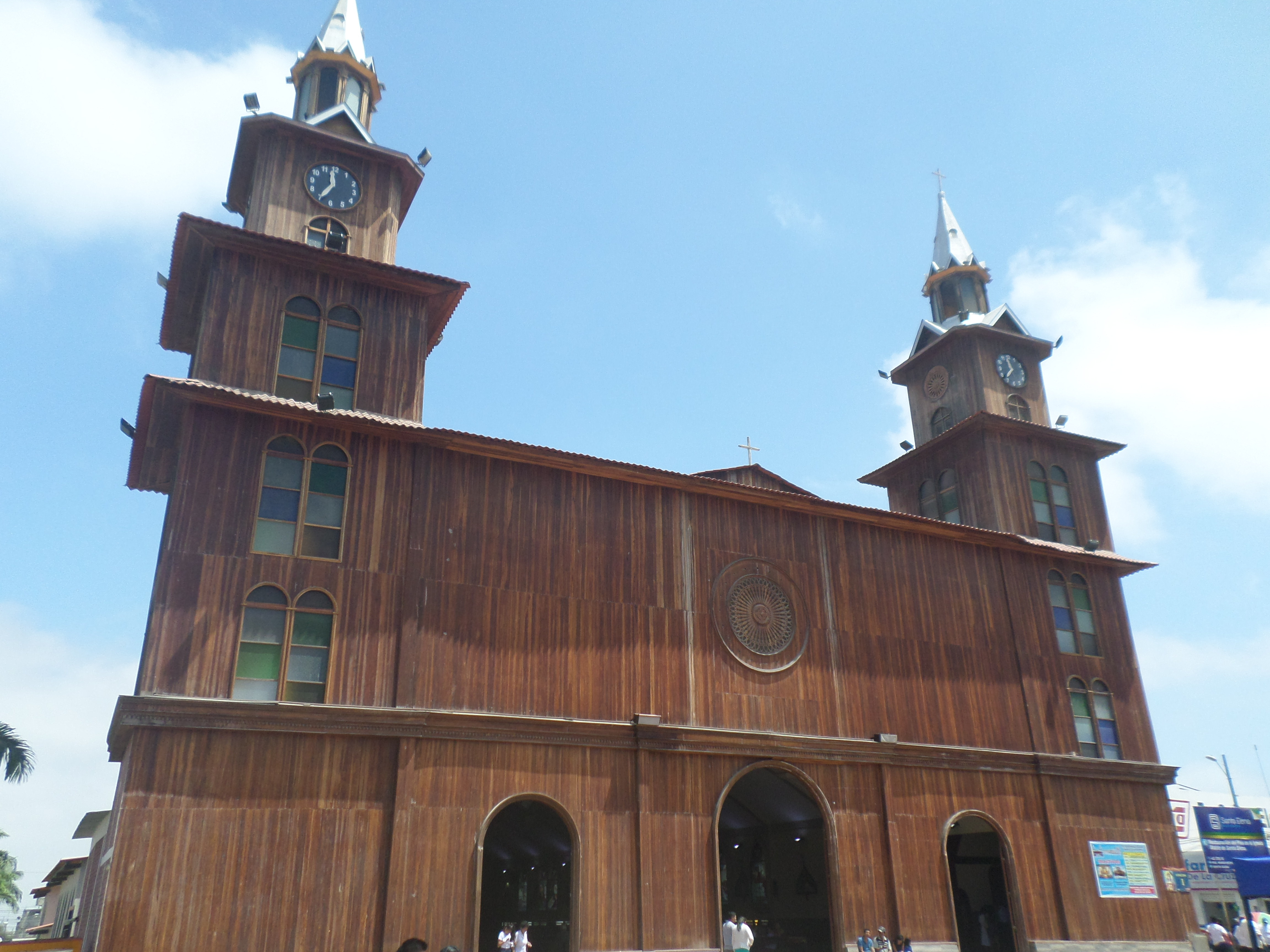 Catedral Emperatriz vista desde el parque